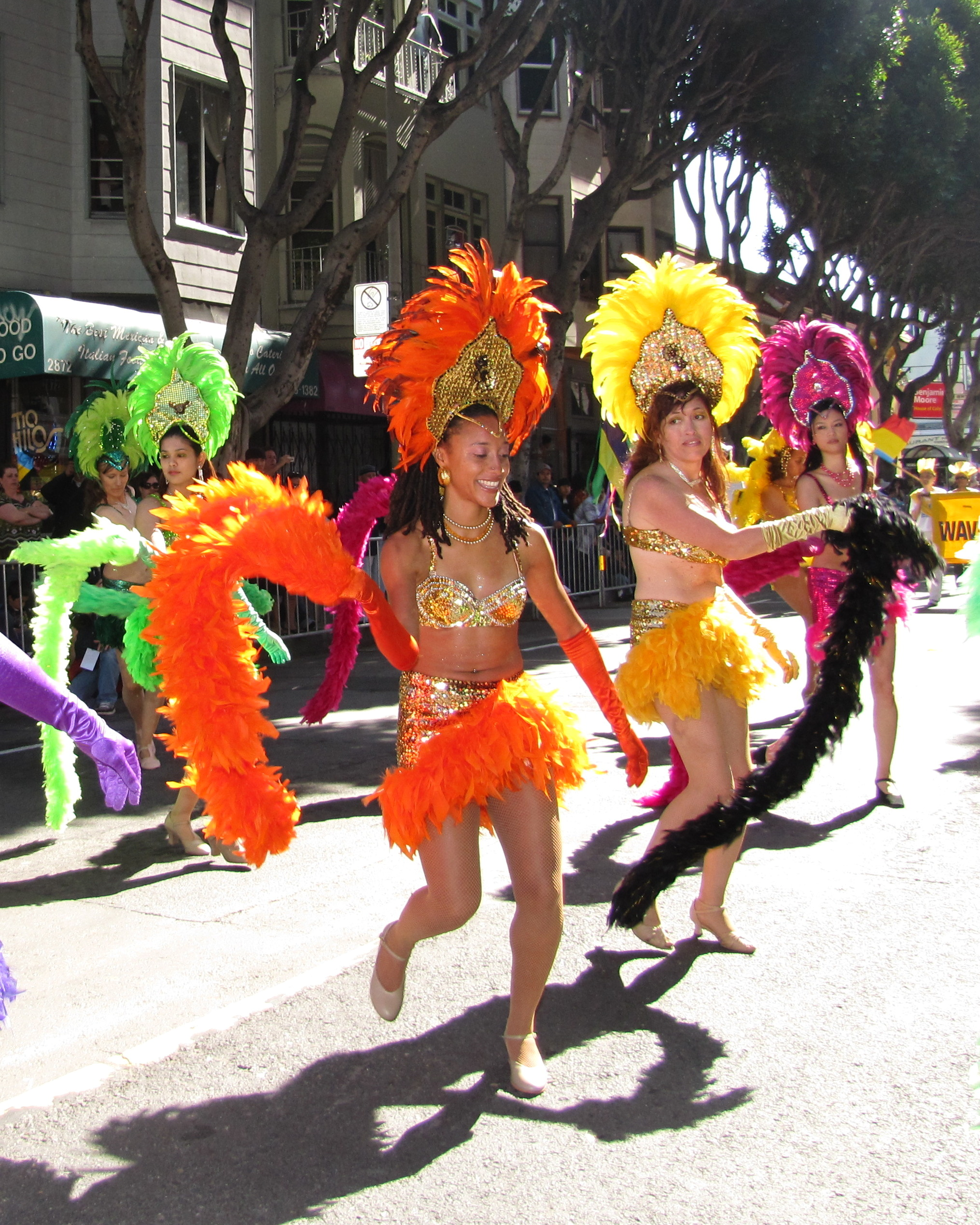 Carnaval San Francisco Parade 2010 133